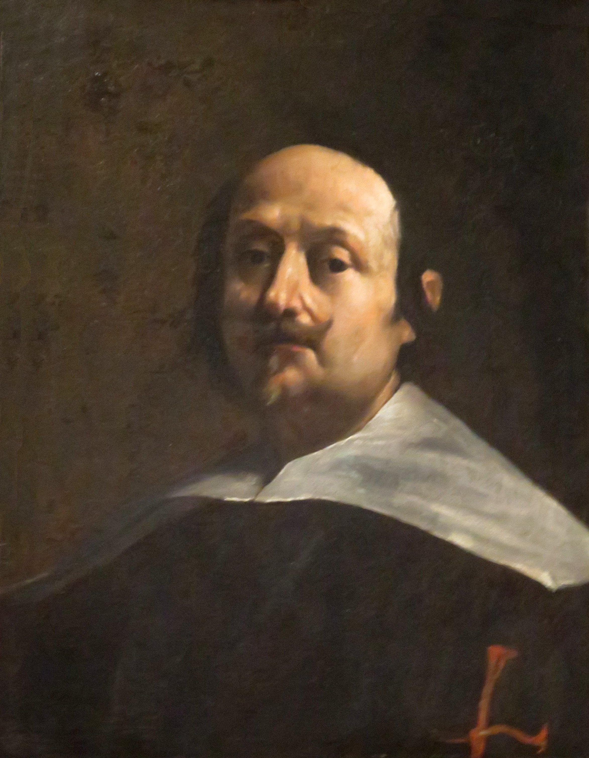 Self-portrait